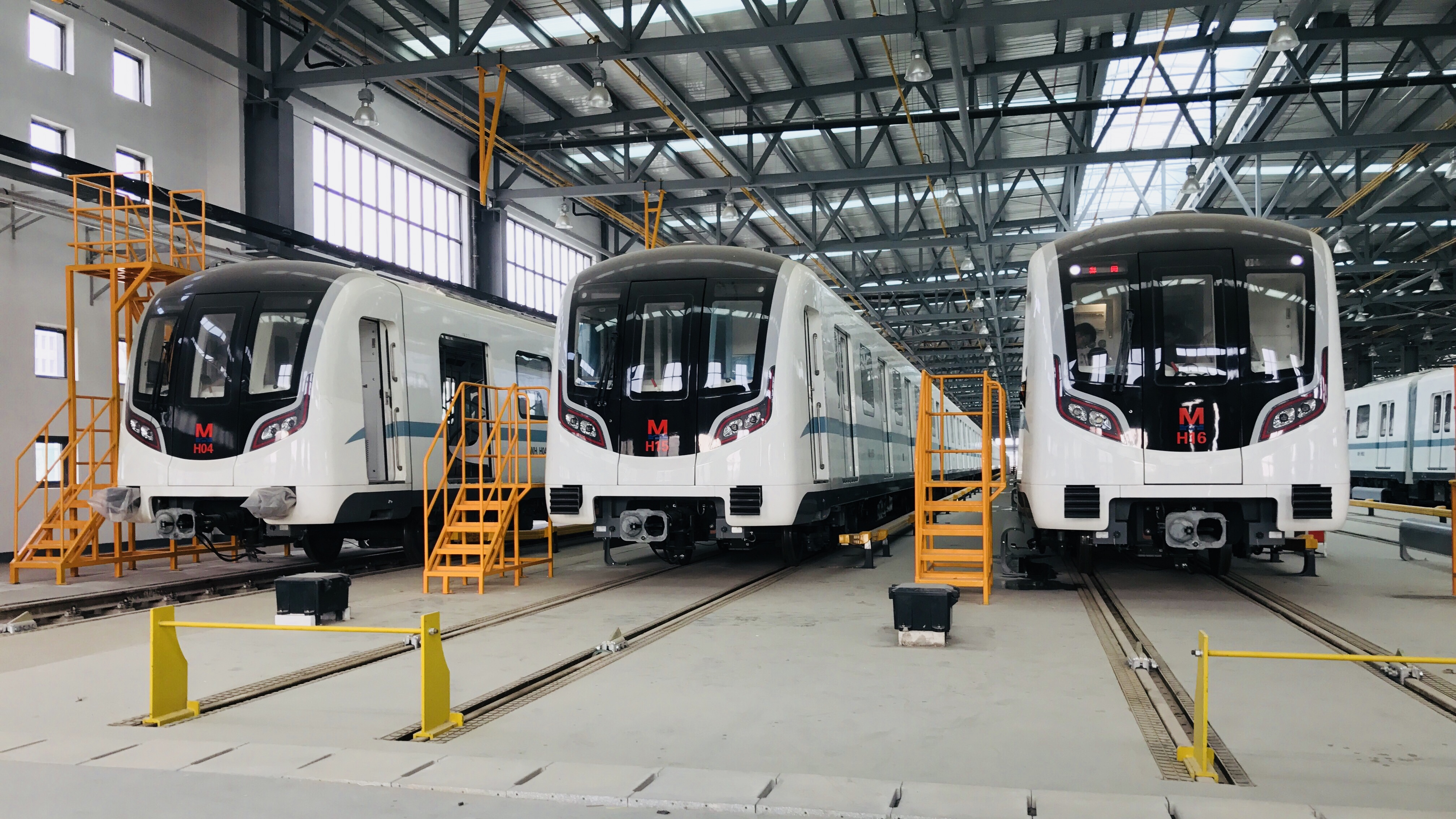 中文（中国大陆）: 8号线列车